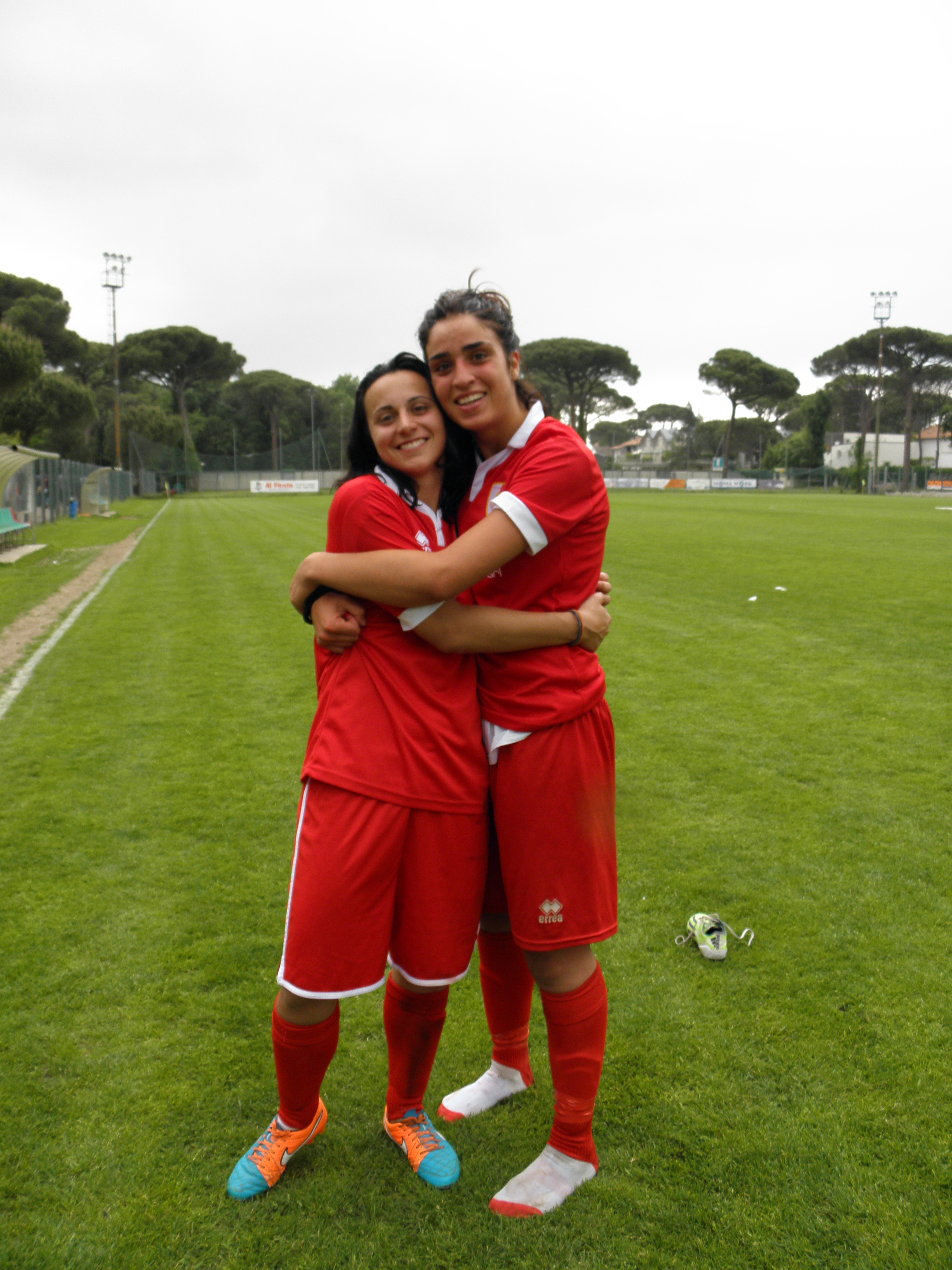 Milano Marittima, Cervia: Stadio Stadio Germano Todoli, partita di play-off di Serie A di calcio femminile 2014-2015, Riviera di Romagna contro San Zaccaria. Giulia Montalti, a sinistra, assieme a Martina Piemonte.